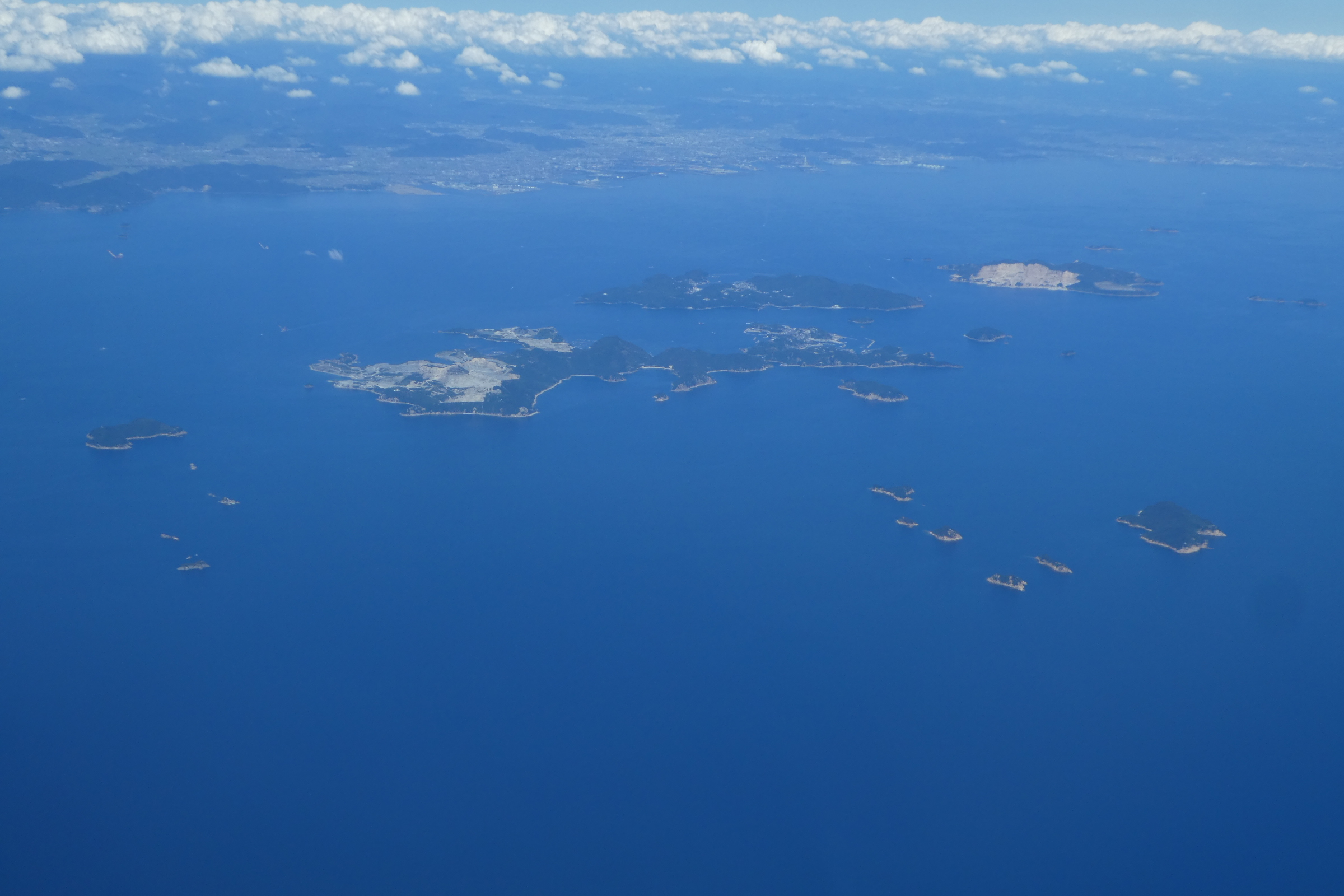 上空から撮影した家島諸島。